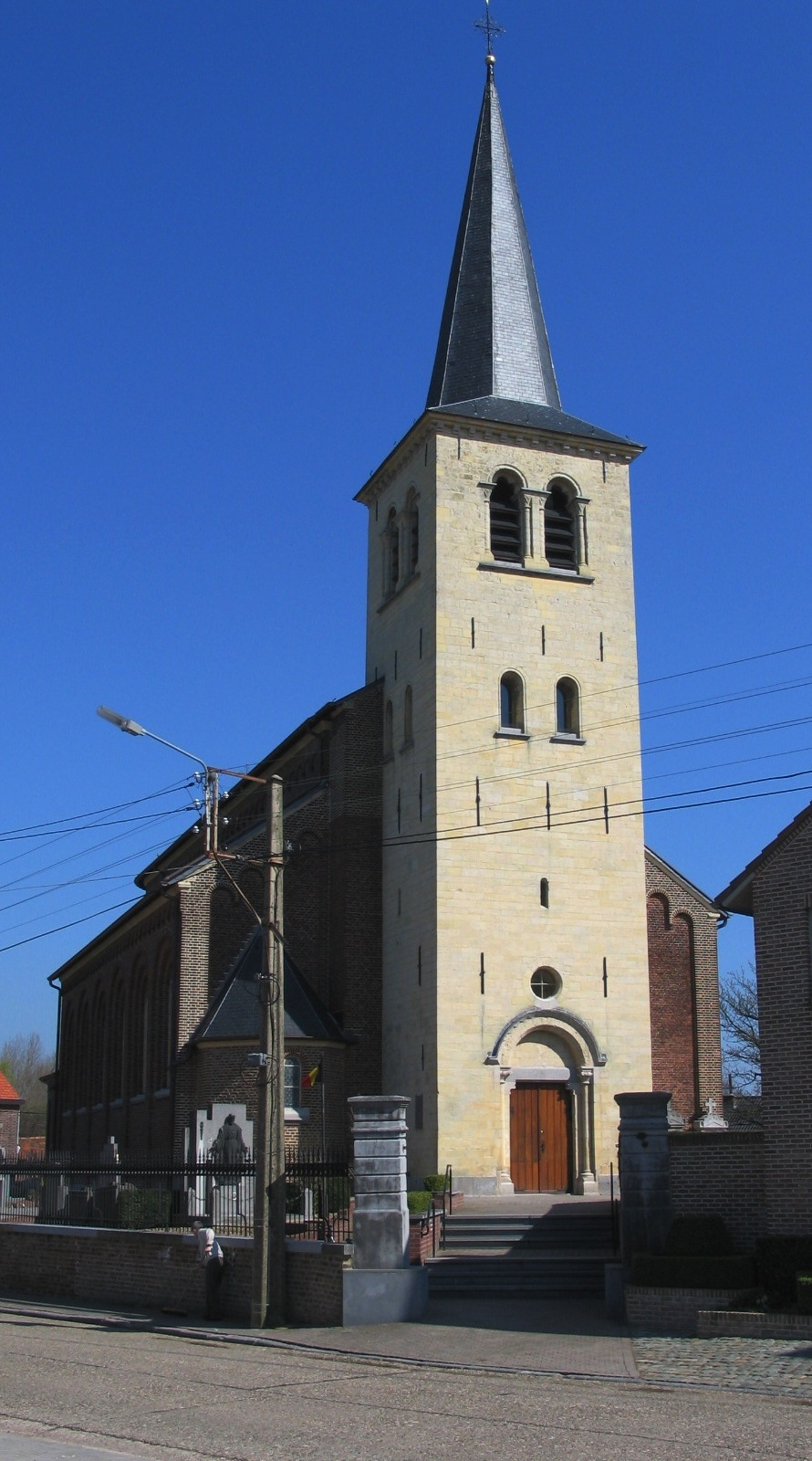 kerk van Membruggen - eigen foto